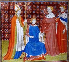 korunovace Filipa V.